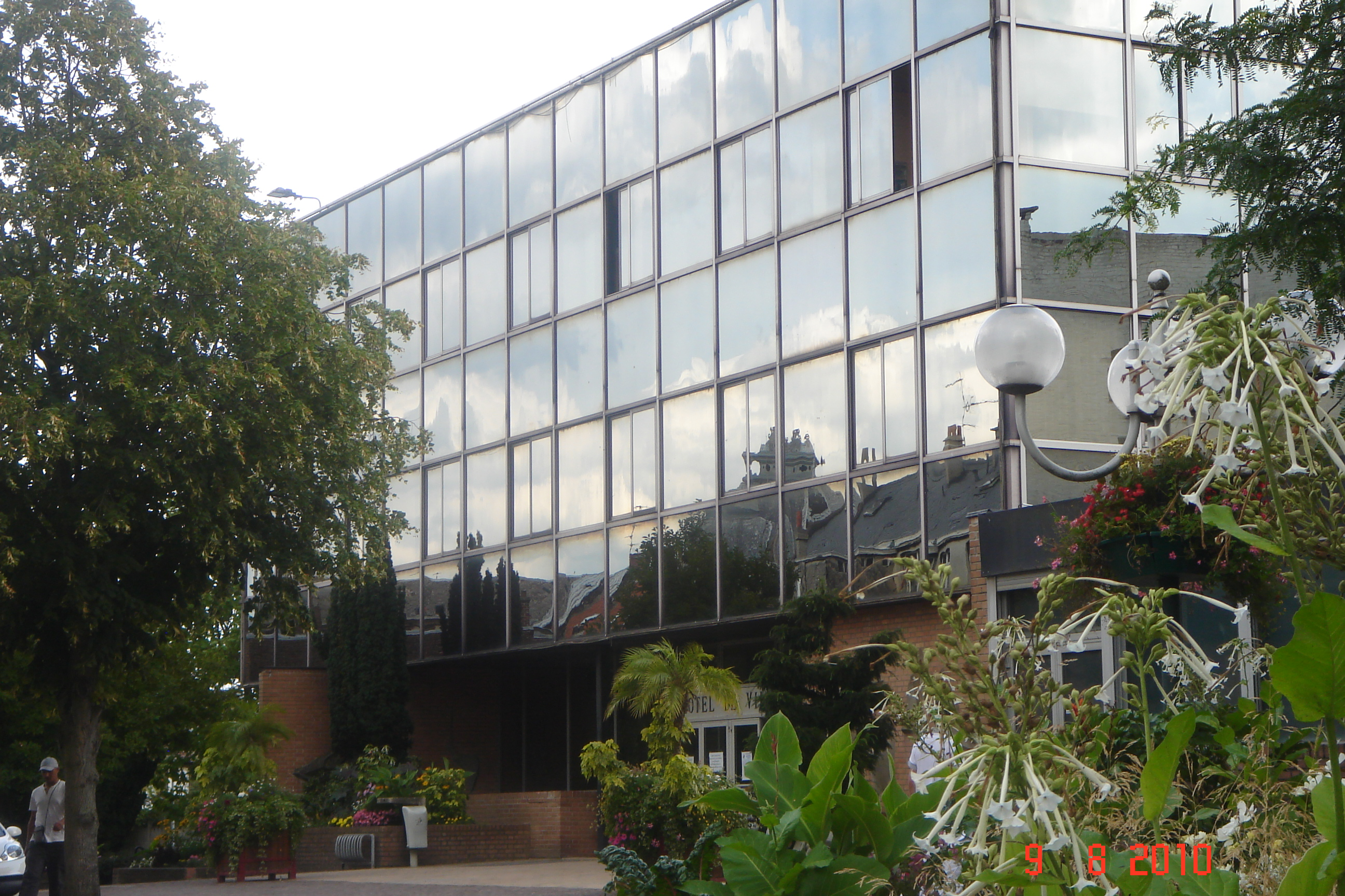 L' Hôtel de Ville de Denain - département du Nord - France